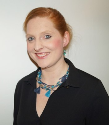 Forsker og Forfatter Sarah Roxana Herlofsen (født1982), bilde rettigheter tilhører Herosa forlaget